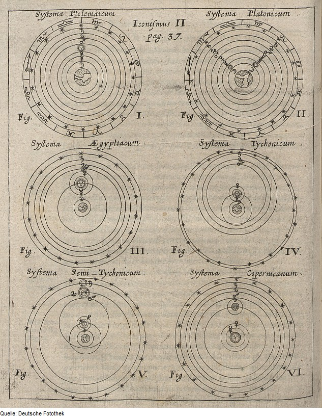 Original image description from the Deutsche FotothekAstronomie & Erde & Himmelskörper